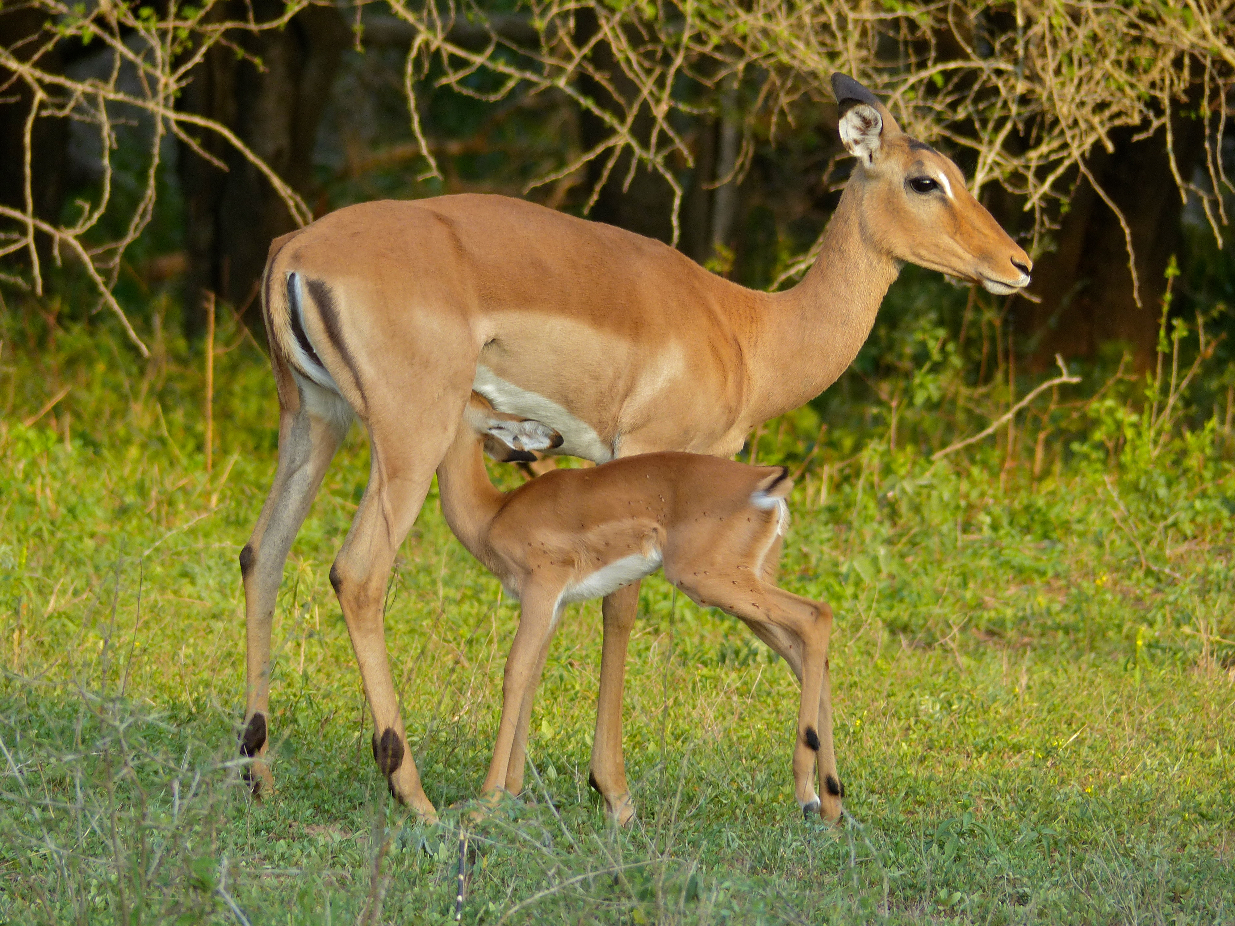 S25 (Crocodile) Road, Kruger NP, SOUTH AFRICA